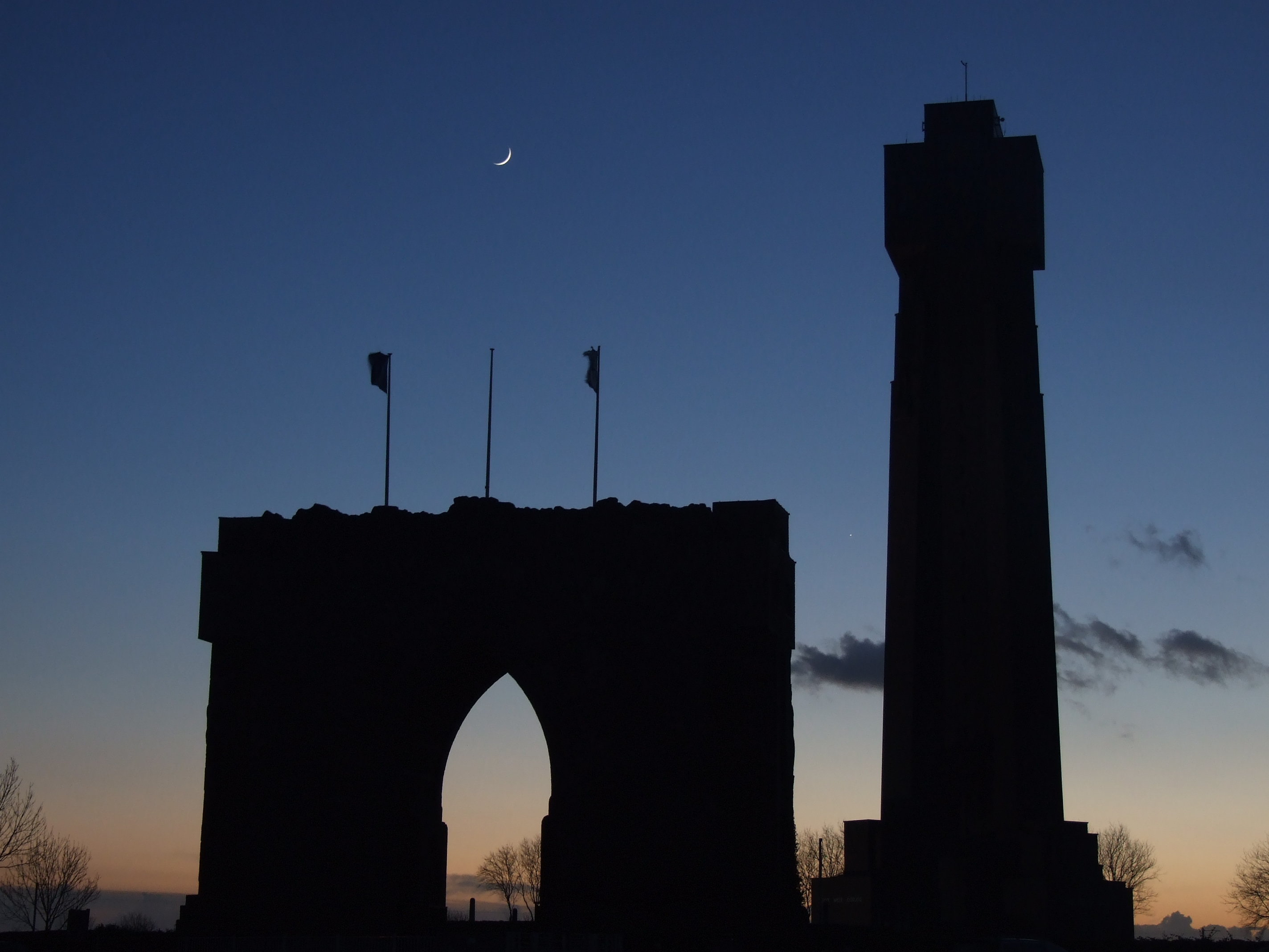 Imagen del IJzertoren de la ciudad de Diksmuide